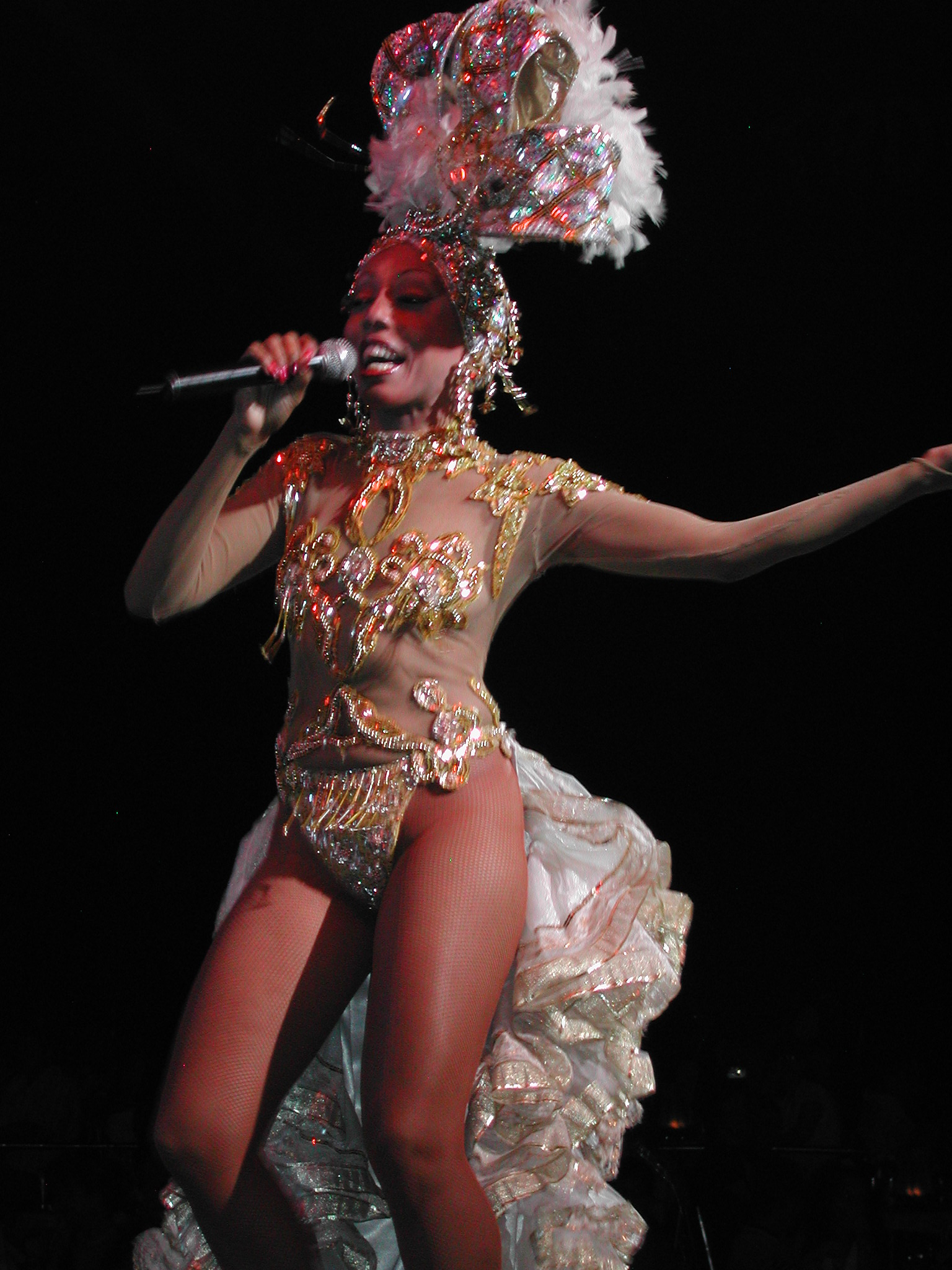 Cabaret Tropicana zu Havanna